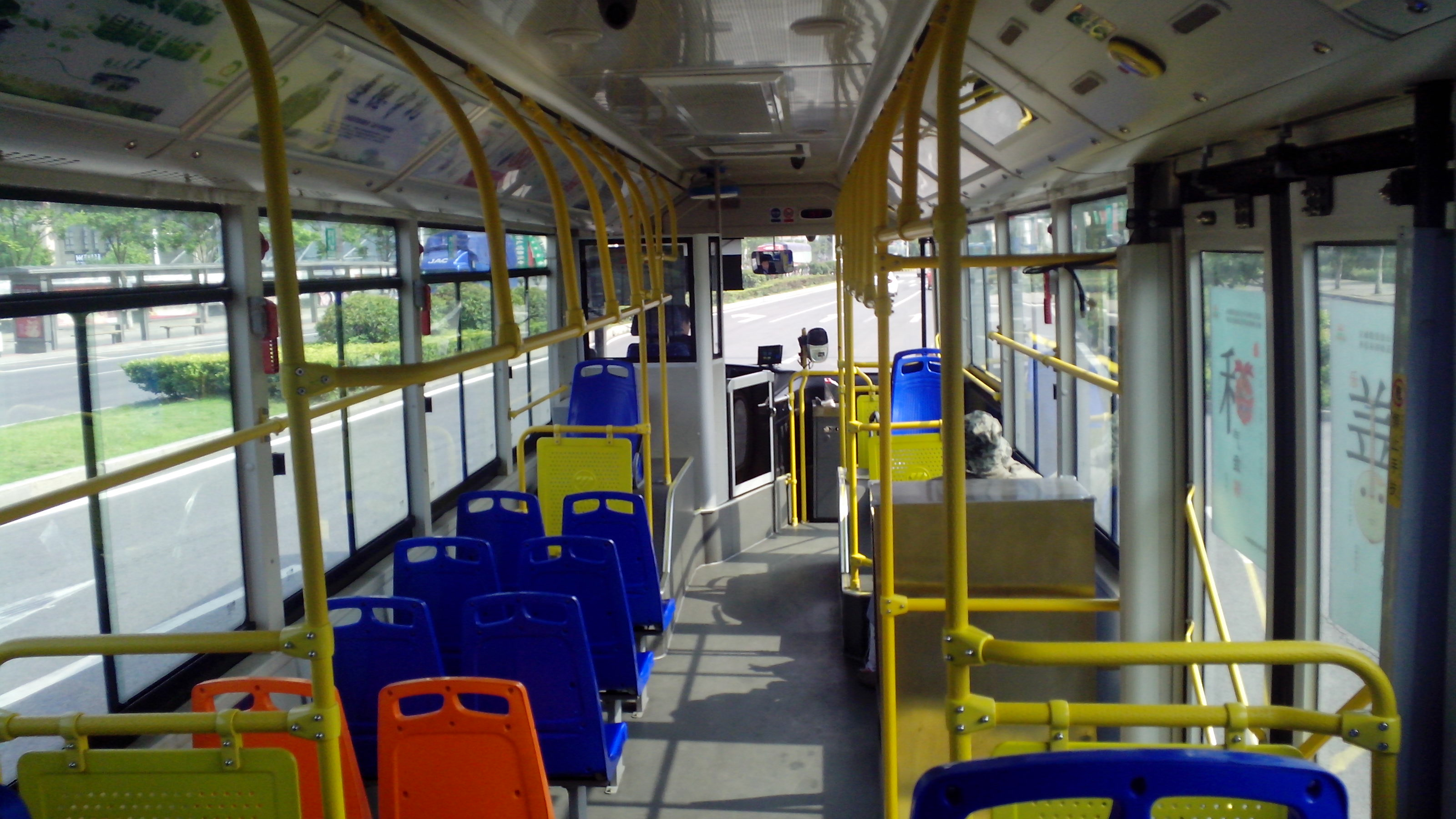 中文（中国大陆）: Bengbu Bus No.109 Interior